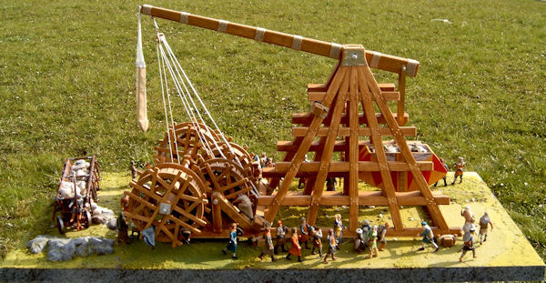 Modell einer muslimischen Steinschleuder in 1:25